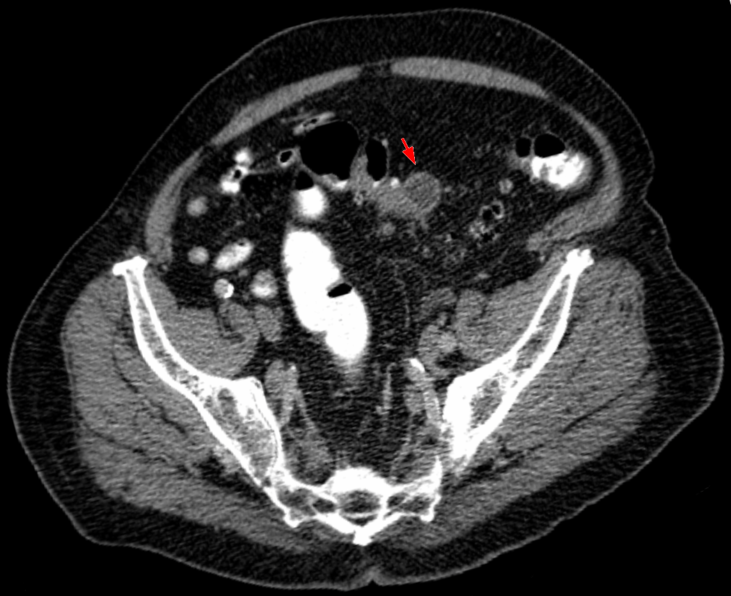 Sigmadivertikulitis in der axialen Computertomographie. Multiple Divertikel, Perforation mit dem kleinen Abszess.